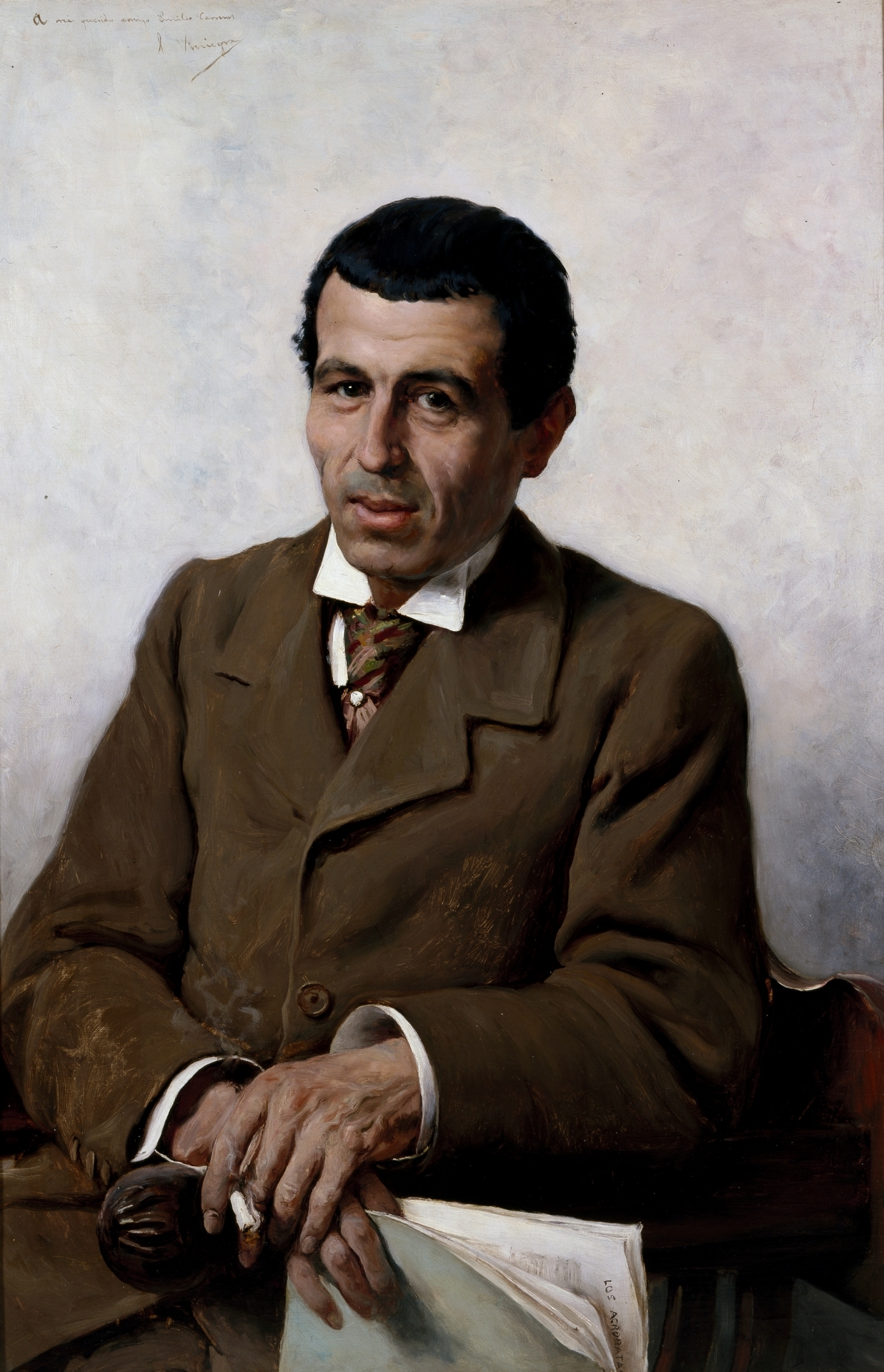 Retrato del actor cómico español Emilio Carreras (1858-1916).